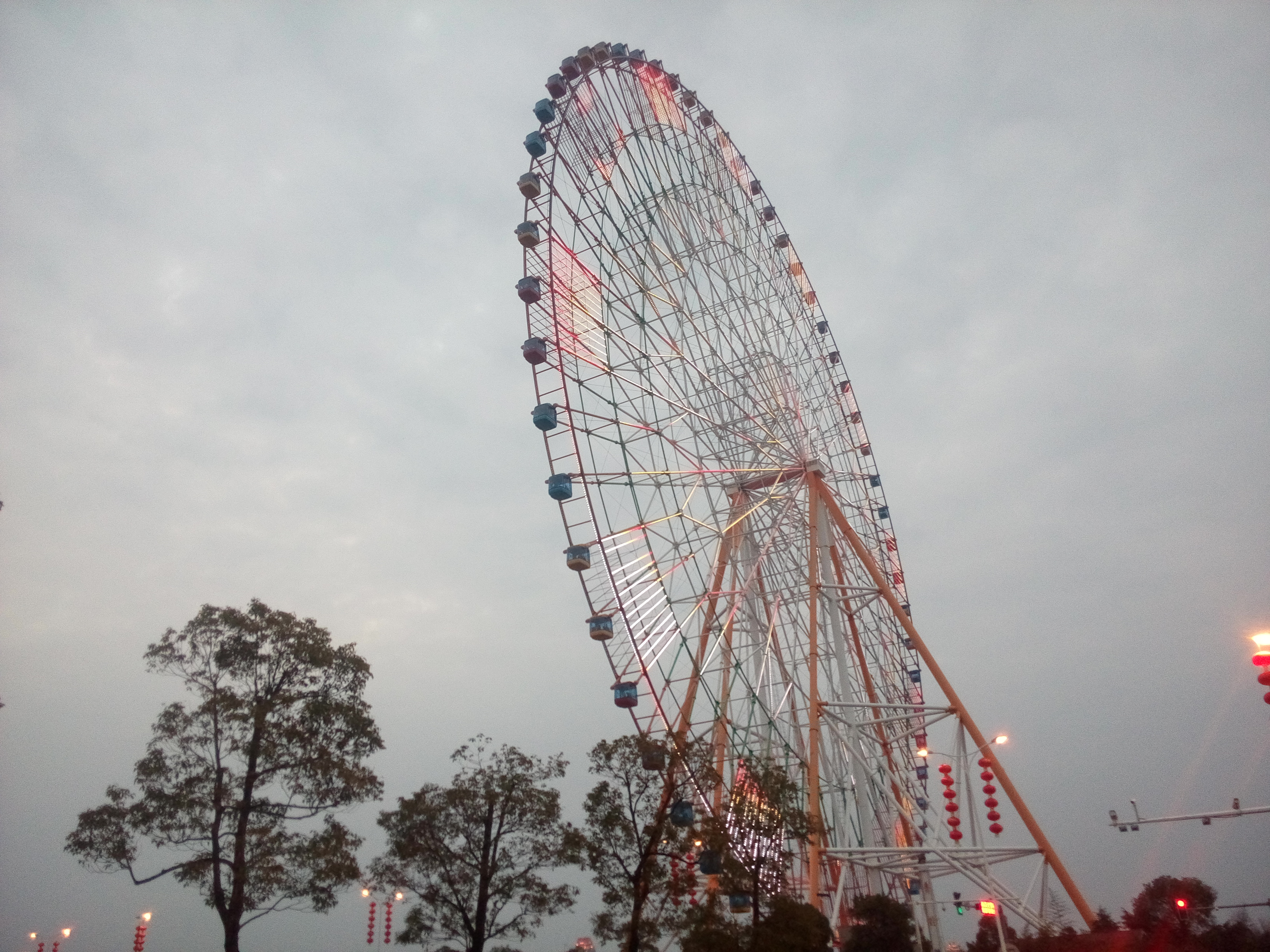 南昌之心摩天轮